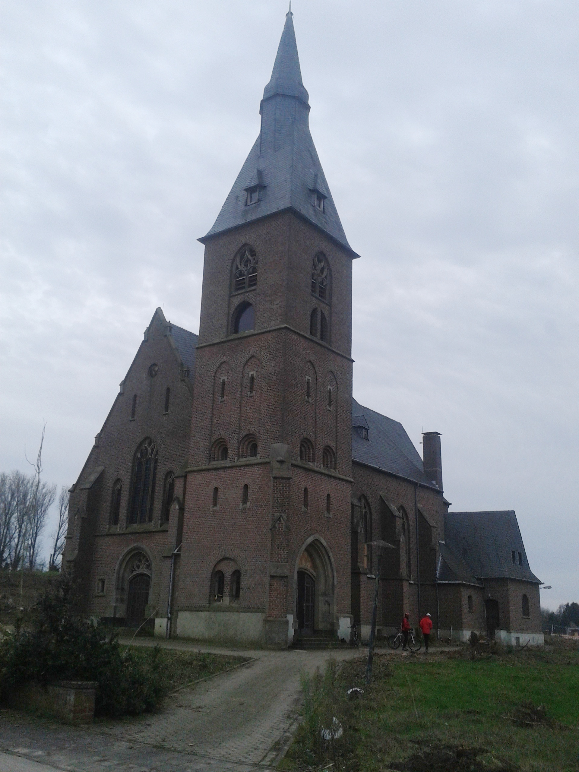 Die St.-Martinus-Kirche in Borschemich (alt) in Erkelenz. Diese Kirche steht seit November 2014 leer, da der Ort 2016 oder 2017 abgebaggert wird.